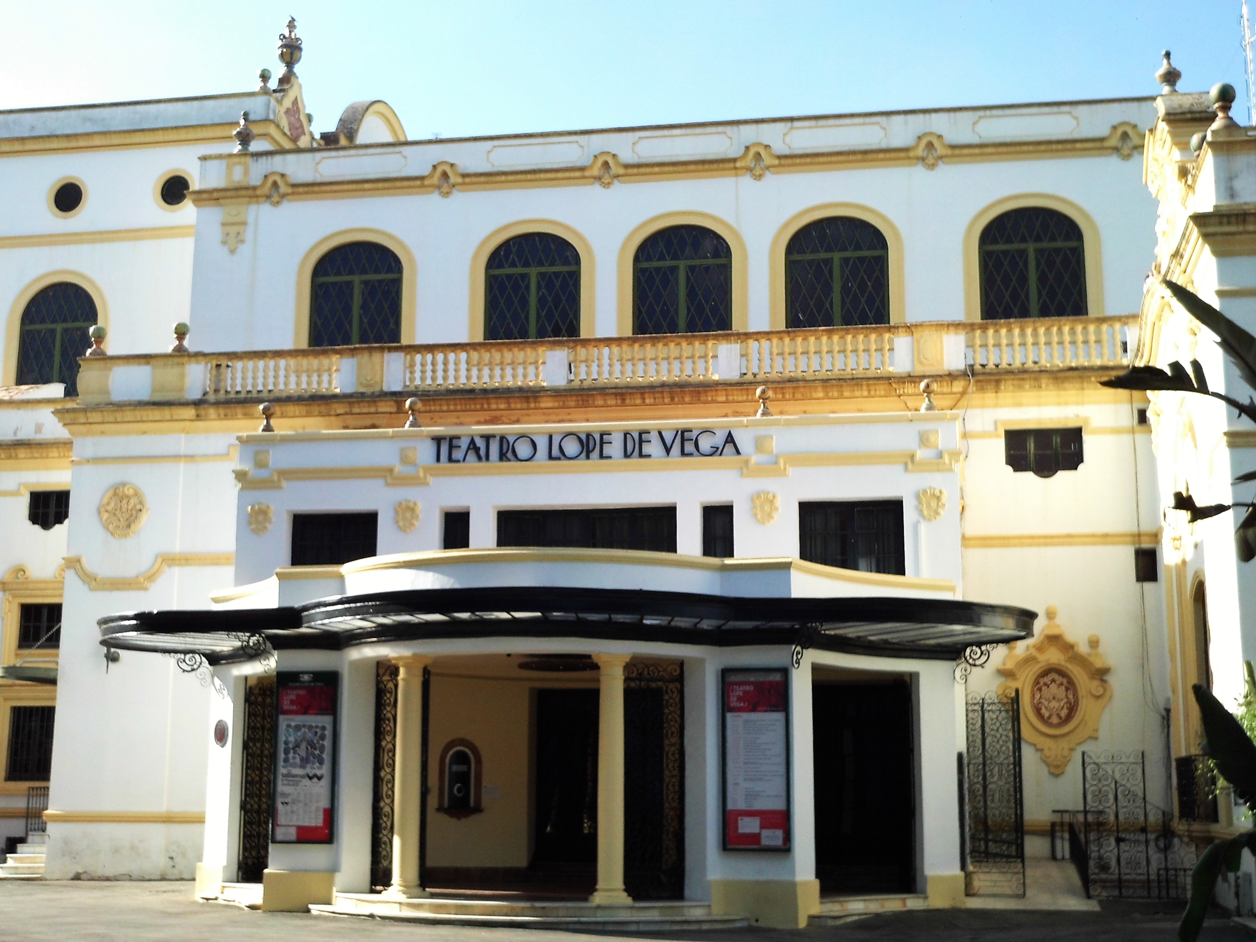 Teatro Lope de Vega. Sevilla, Andalucía, España.